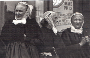 3 Coiffes - Polka à rennes- Début des années 50.